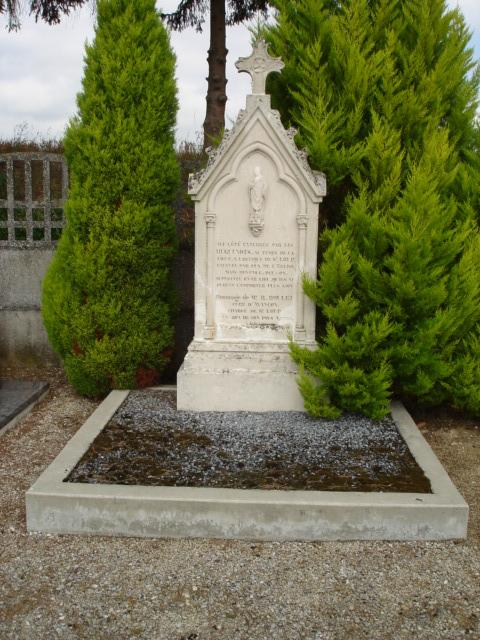 Saint Loup En Champagne Source Fait Moi même Date="2008.08.04" Auteur= Thoin1233